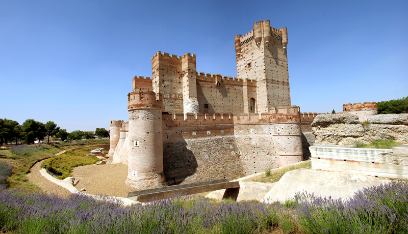 Castillo de la Mota, Medina del Campo, Valladolid, Spain.